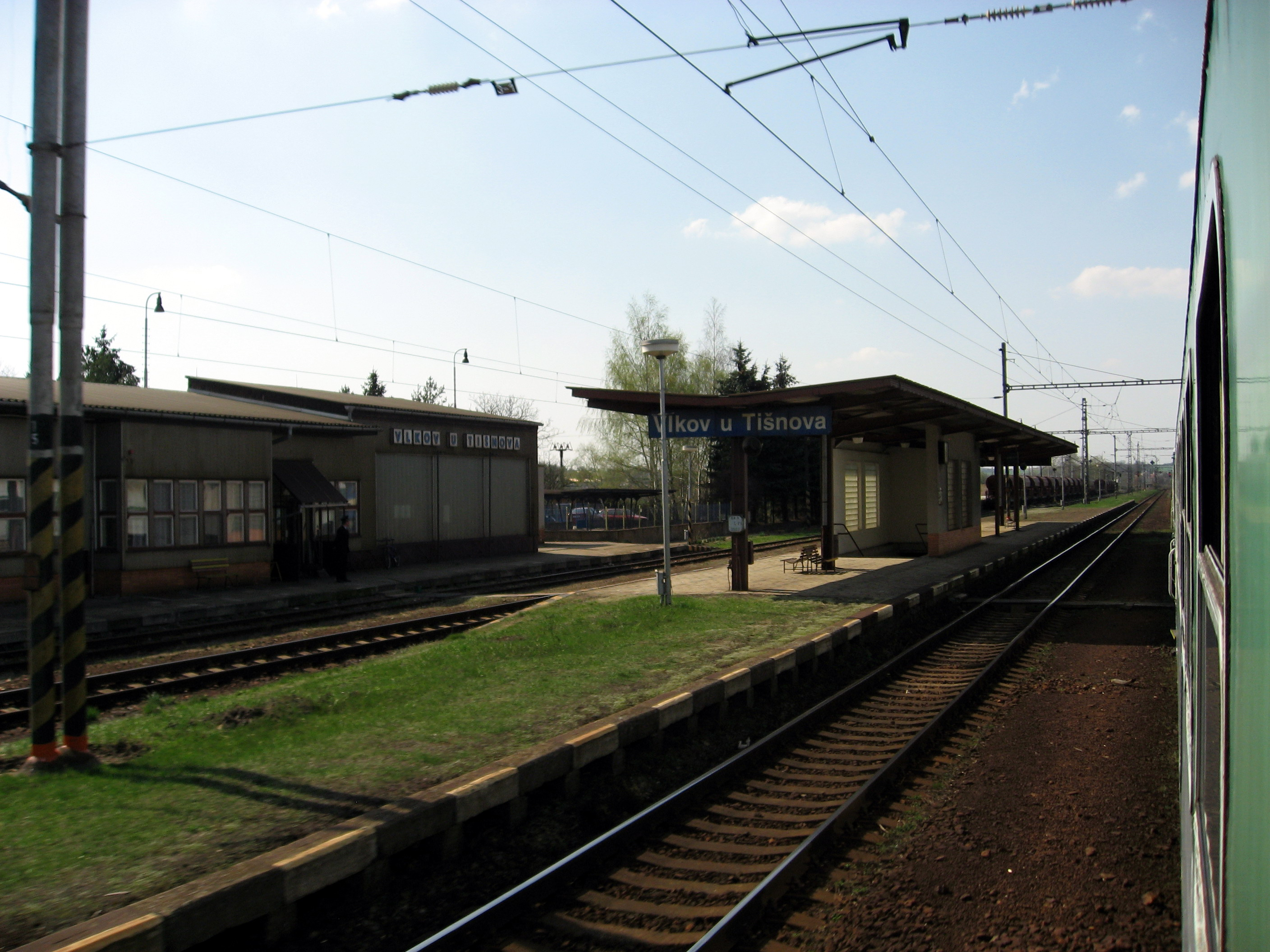 Vlkov u Tišnova, železniční stanice